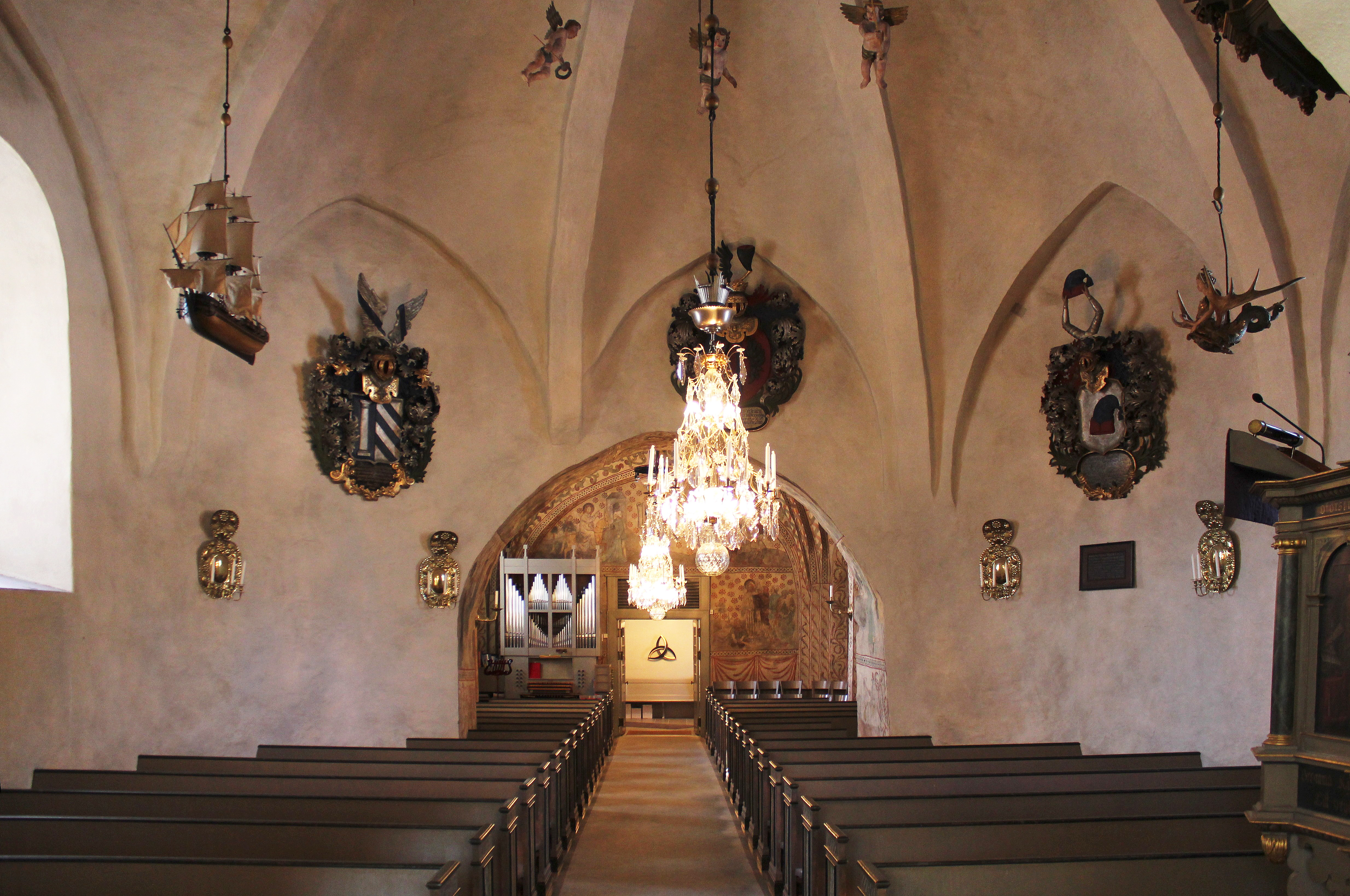 Bromma kyrka. Interiör från koret. Till vänster i långhuset syns orgeln, som kom på plats efter 1954, tillverkad av Marcussen og son (Danmark) och i mitten i vapenhuset syns ett konstverk av silverplåt i form av en symbol som uppsattes 1979. Ornamentet består av en enda linje, som bildar denna urgamla figur "Triquetra", en symbol för oändligheten och treenigheten.